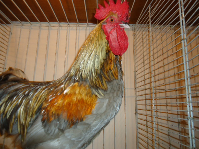 Coq de pêche du Limousin